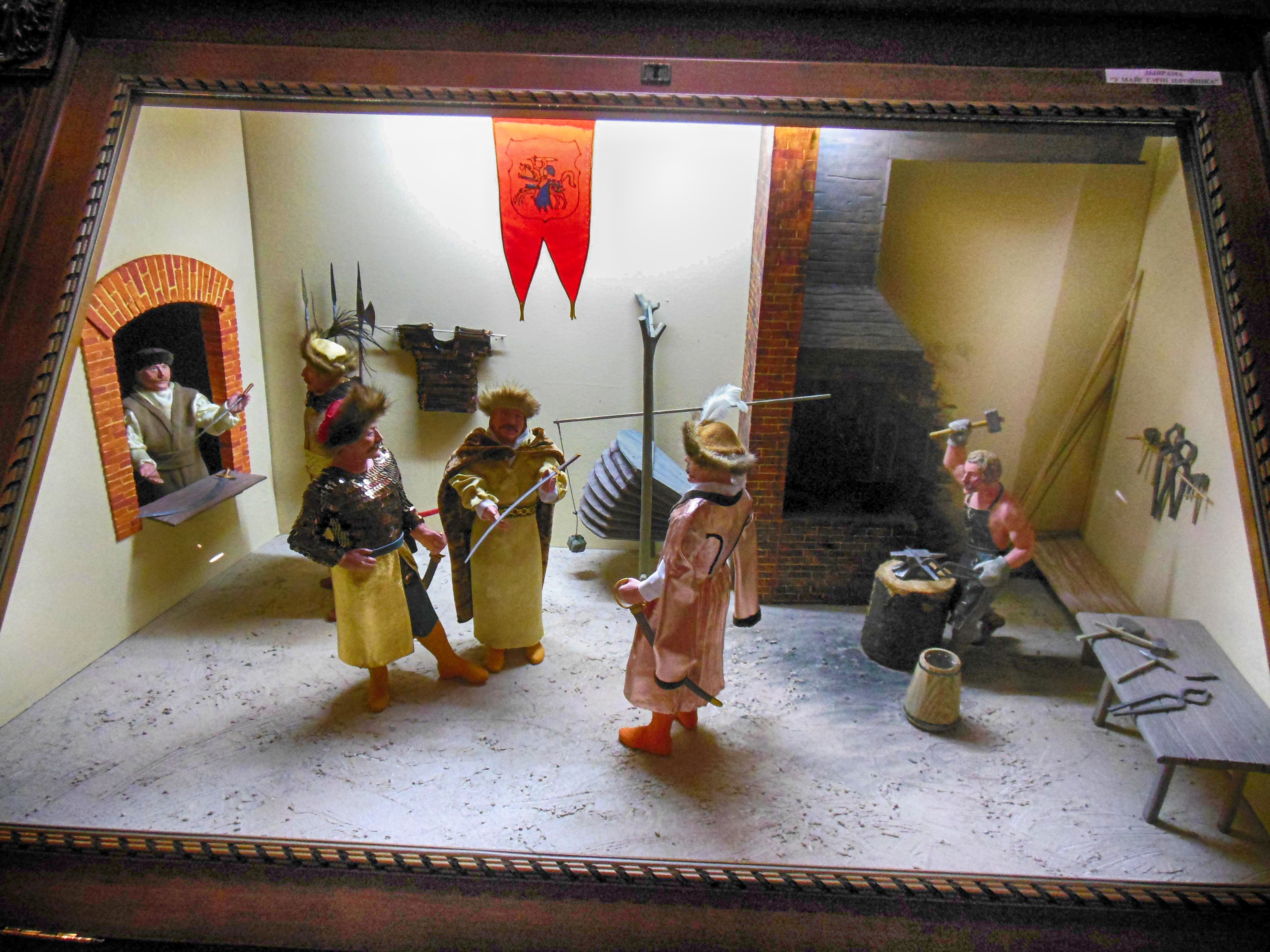 Беларуская (тарашкевіца): Экспазыцыя музэя гісторыі Магілева